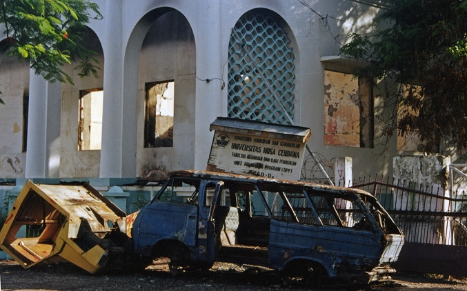 Zerstörungen in Dili im Oktober 1999